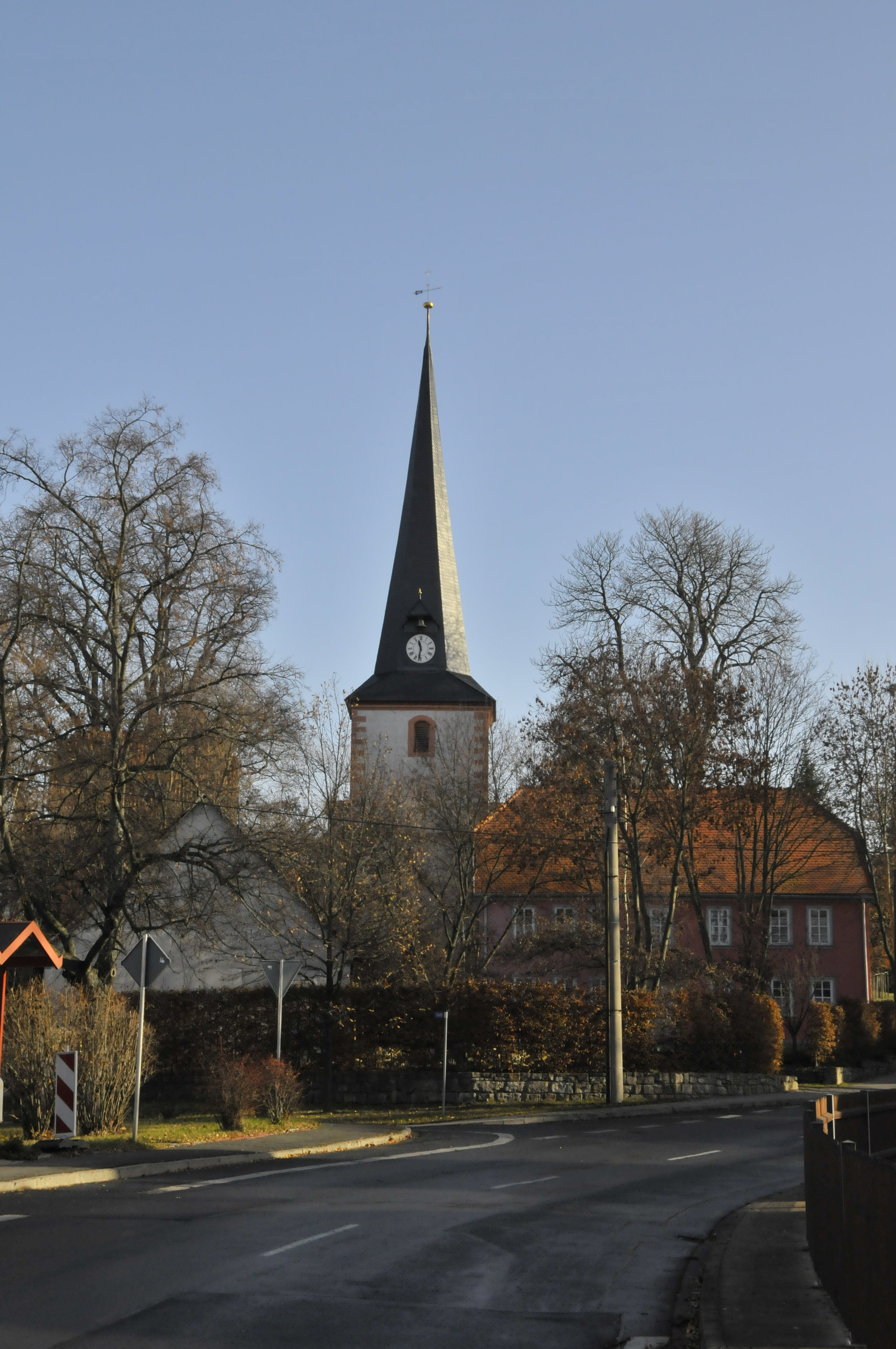 Werningsleben, Ortsstraße mit Kirche